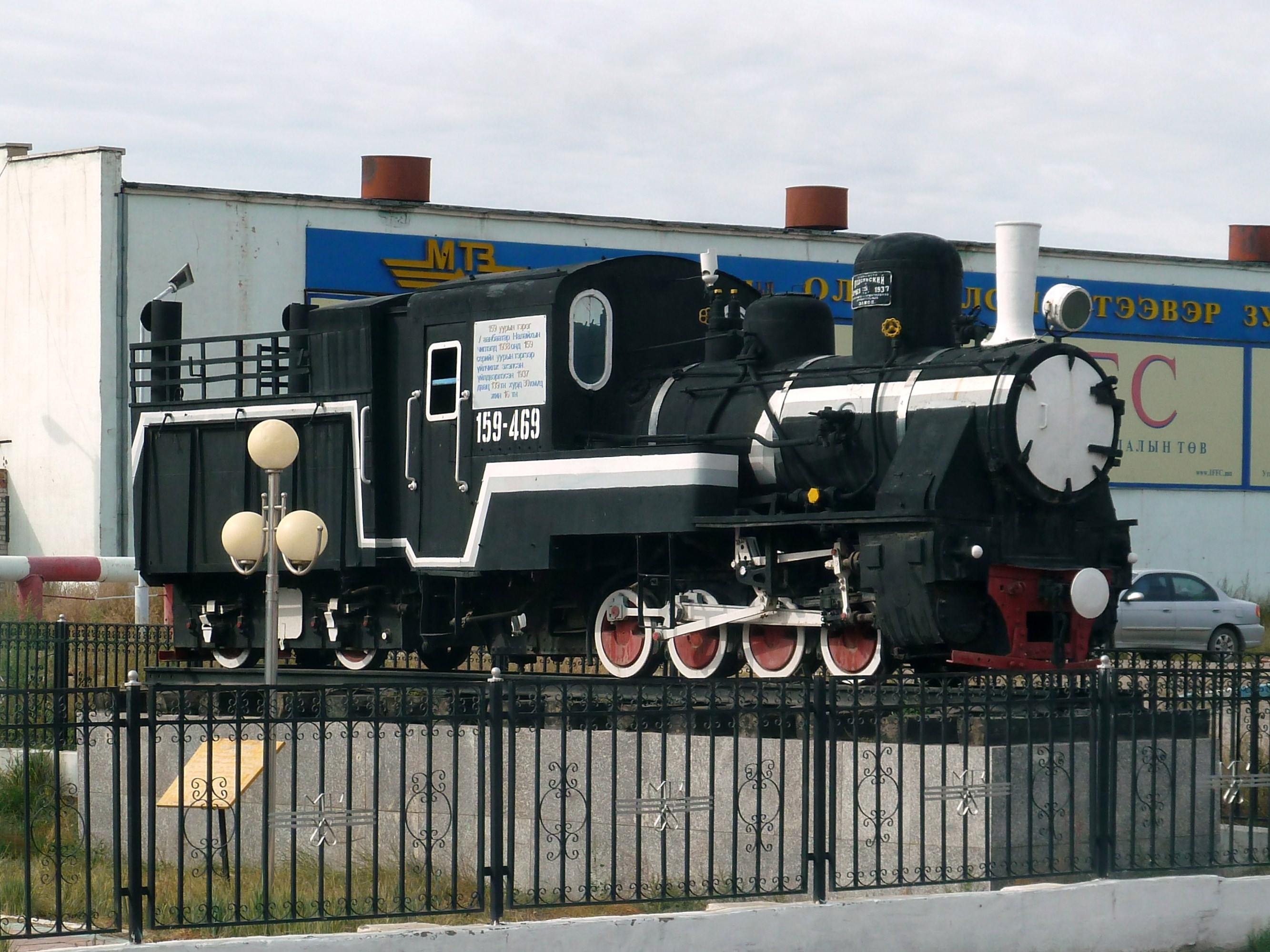 Transport ferroviaire en Mongolie, en Mongolie.